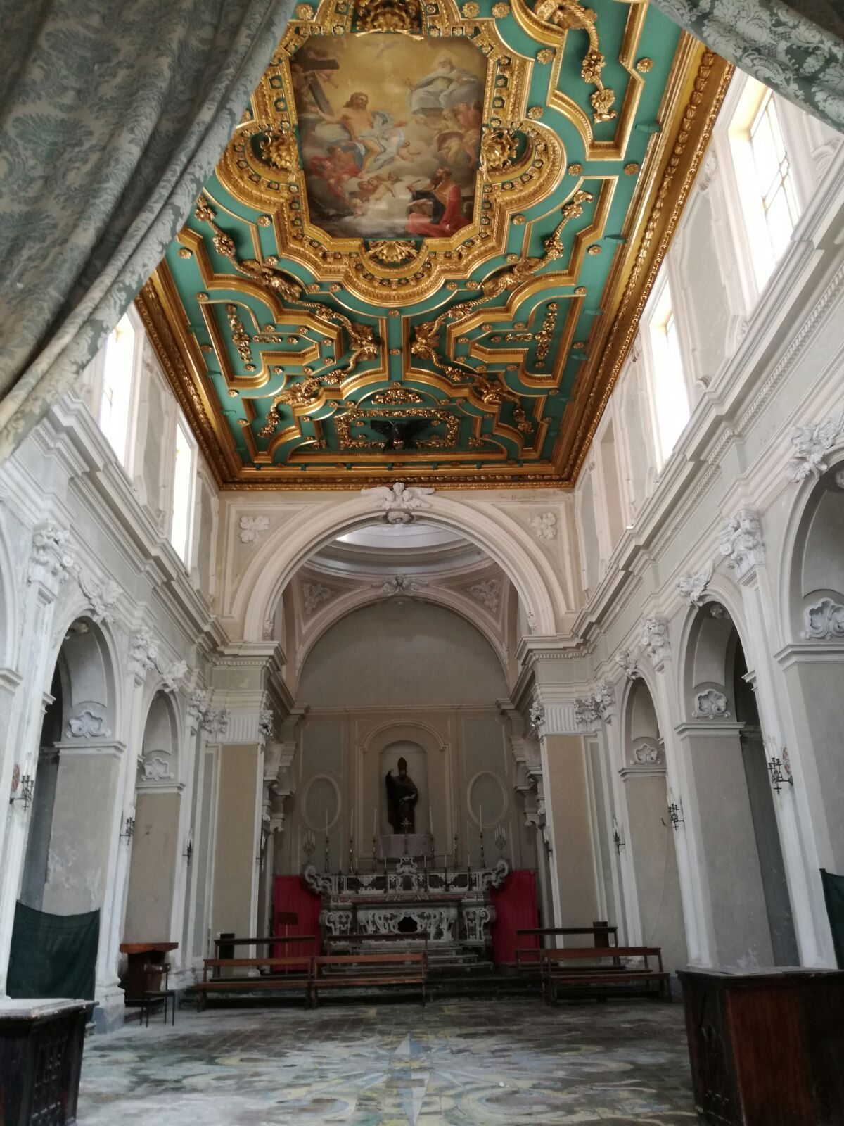 Interno della chiesa di Sant'Agostino (ex-Santissima Trinità) di Sessa Aurunca